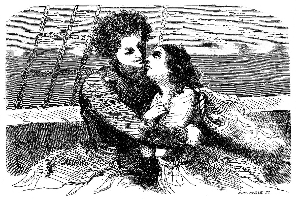 Illustration non signée (Maurice Sand ?) pour la nouvelle de George Sand "Melchior" rééditée avec son roman "Indiana", Paris, Hetzel, 1861, p.87. Illustration en première page de la nouvelle. L'illustration n'est pas signée. Toutes celles de Tony Johannot portent la signature "T. Johannot" : celle-ci non, donc je suppose qu'il s'agit d'un dessin de Maurice Sand. Gravure par H. Delaville (signature en bas à droite).